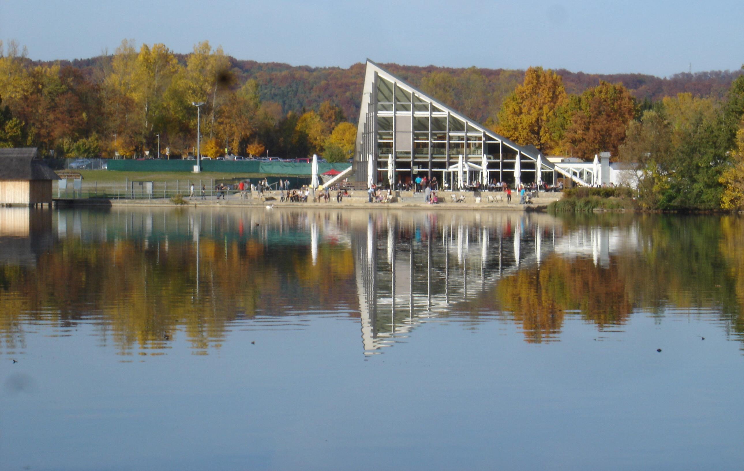 Hohenfelden Am Stausee Gaststättengebäude